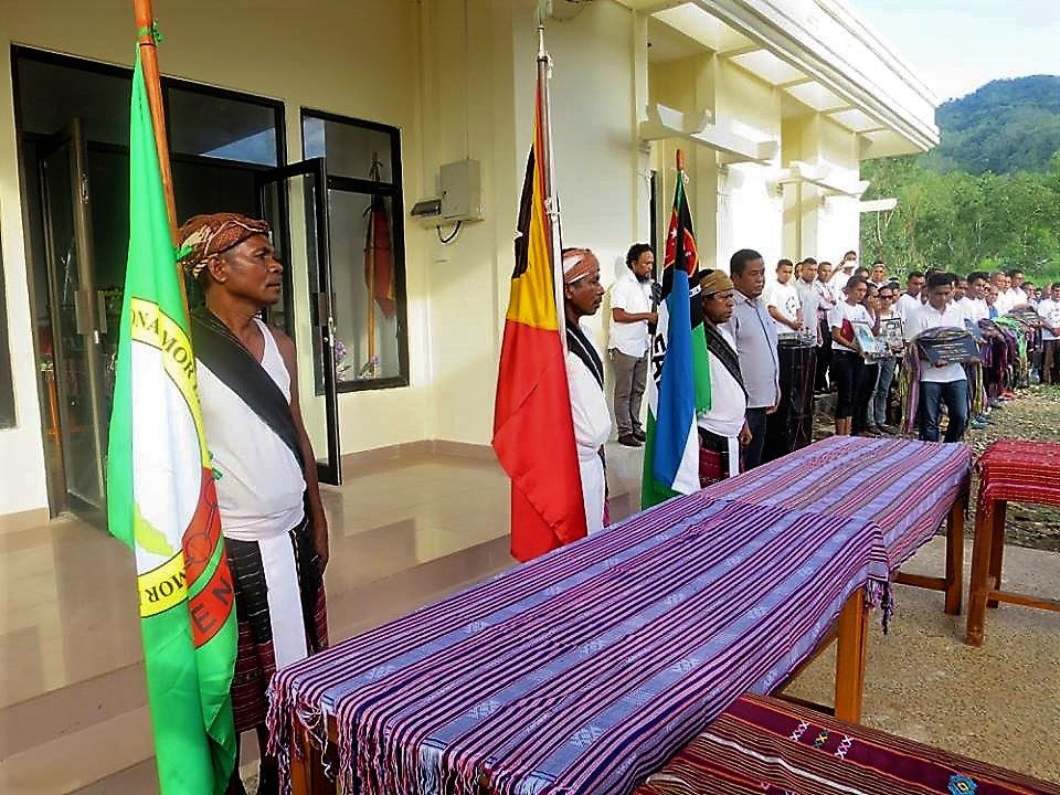 Homenagem aos Heróis e Mártires da RENETIL, Jardim dos Heróis e Martires da Pátria em Metinaro